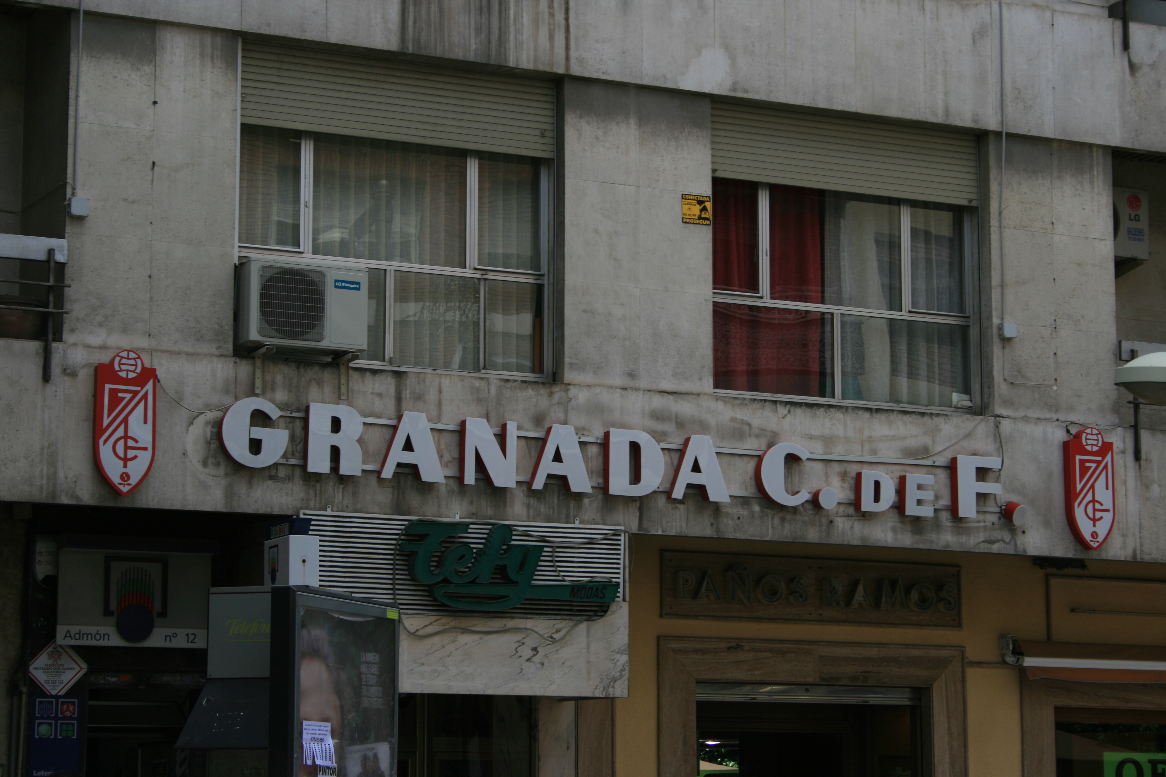 Fachada de la sede del Granada C.F., en calle Recogidas de Granada.